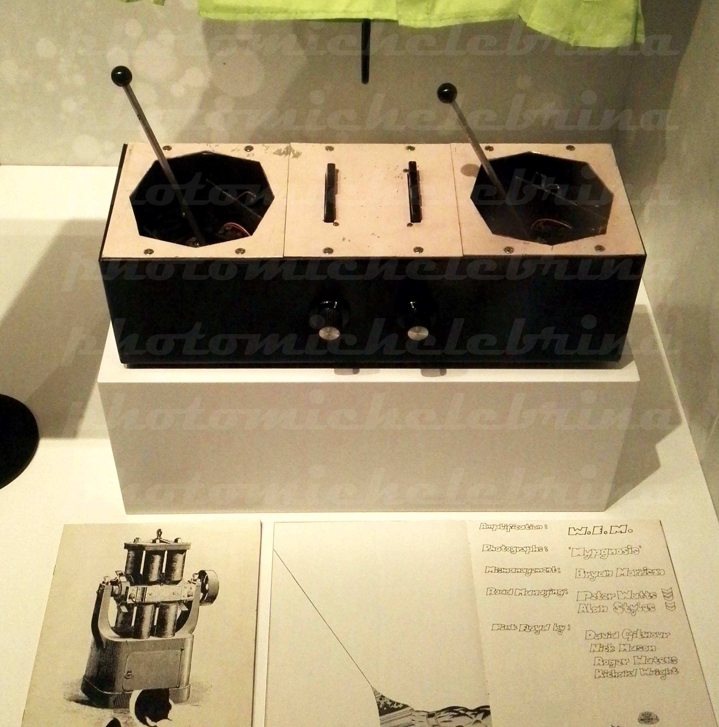 L'Azimuth Co-ordinator esposto al Macro di Roma nel 2018